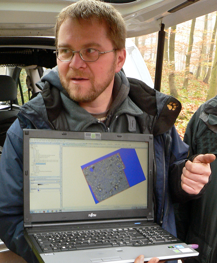 Jens Berthold bei geophysikalischen Prospektionen an der Heisterburg